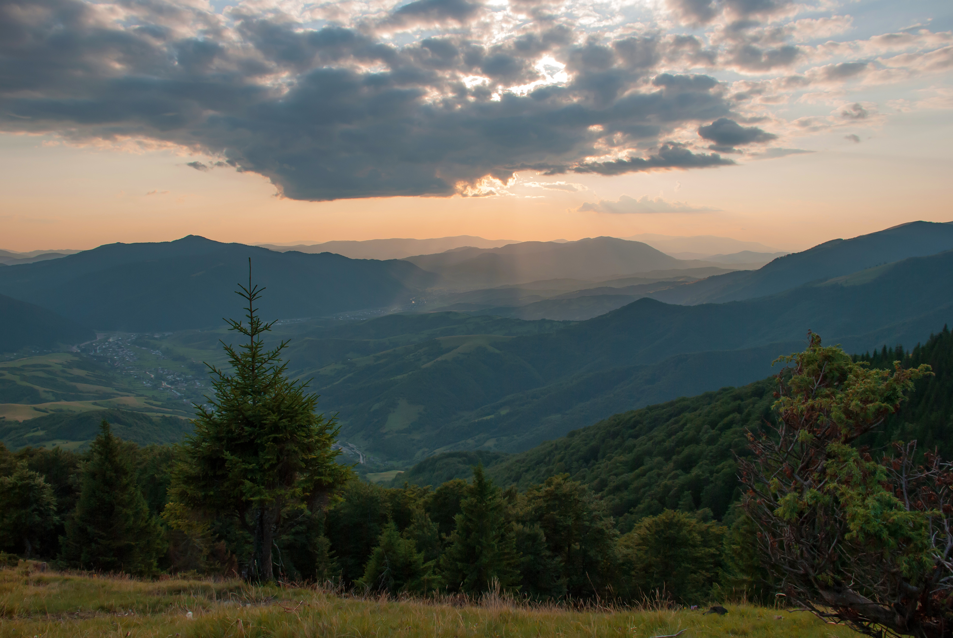 НПП** «Синевир», Міжгірський, Хустський райони